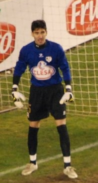 El portero del Rayo Vallecano - David Cobeño